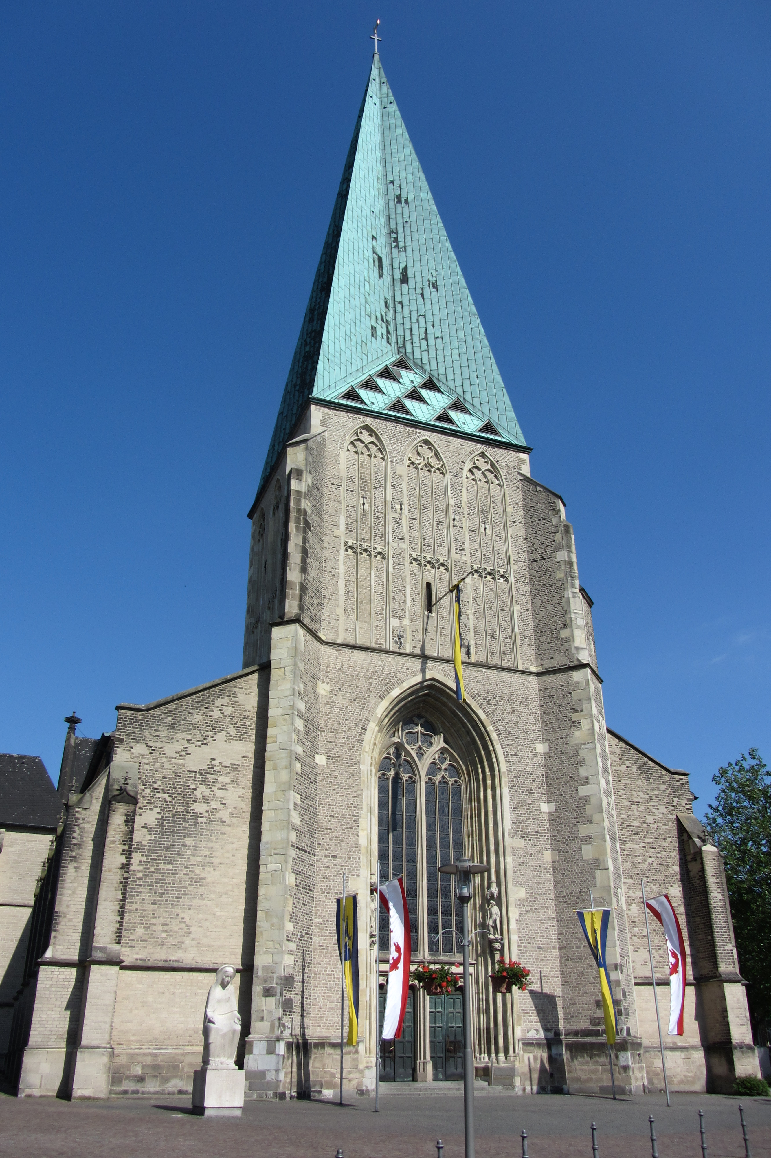 St.-Georg-Kirche in Bocholt Pfingsten 2012